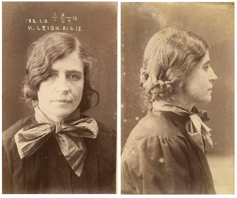 Kate Leigh